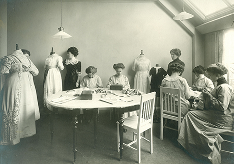 Fotografi från Birgittaskolan. Text på baksidan "Sta Referingsgatan 19-21, 1910". Foto Almberg och Preinitz, Stockholm. Emy Fick, Enskilt arkiv 4, Östergötlands museum.